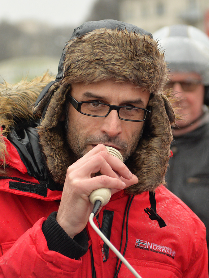 Nix au Festival International de la Bande Dessinée d'Angoulême 2016.